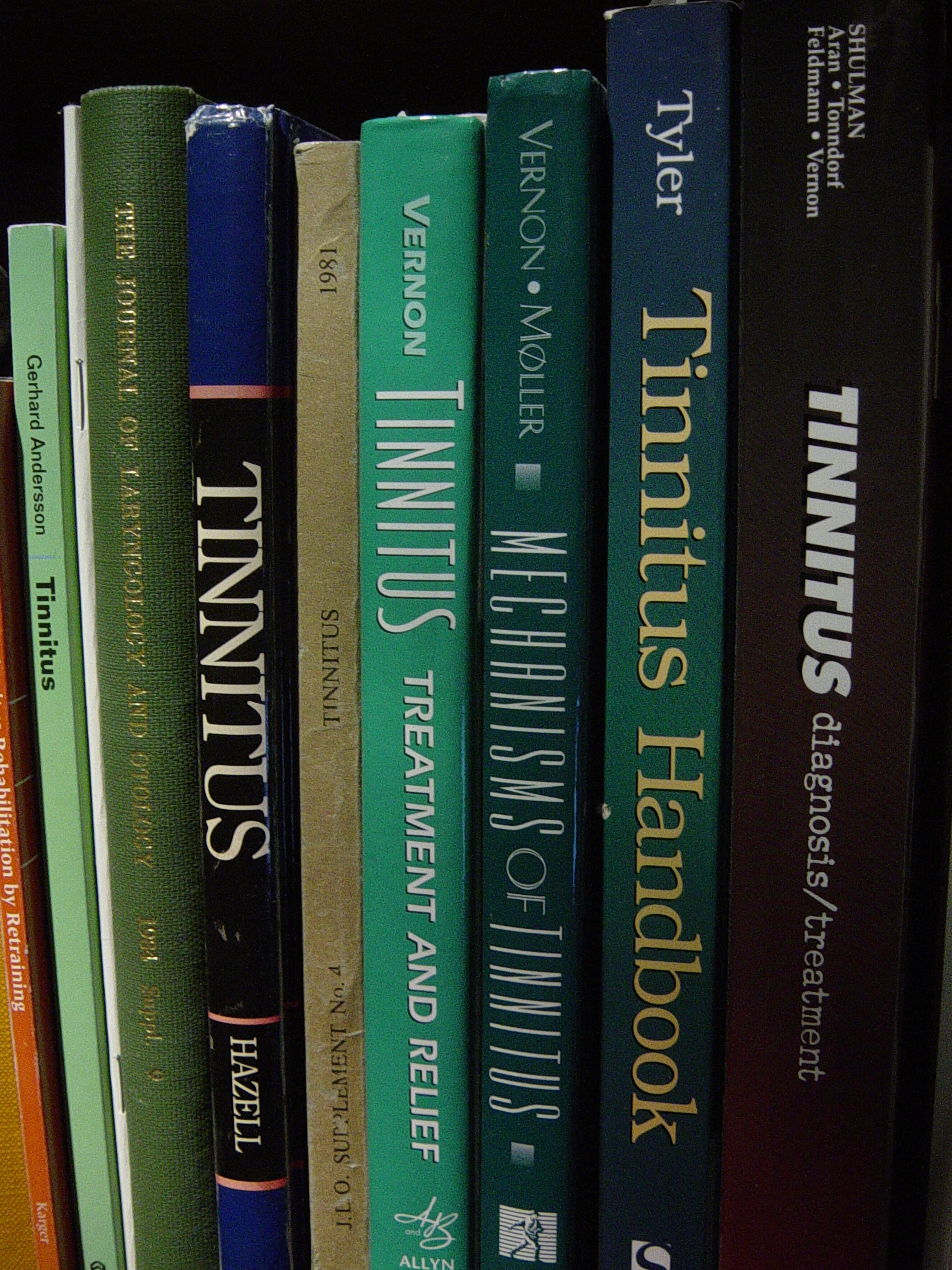 Books on tinnitus